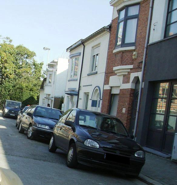 rue Liévin Verstraeten Auderghem